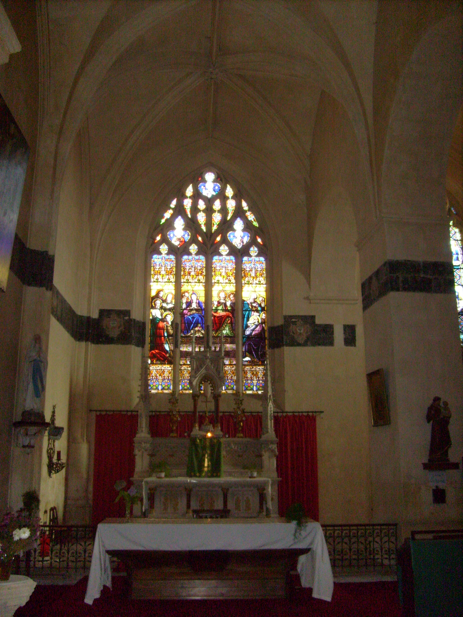 Intérieur de l'église de Saint-Fort sur Gironde